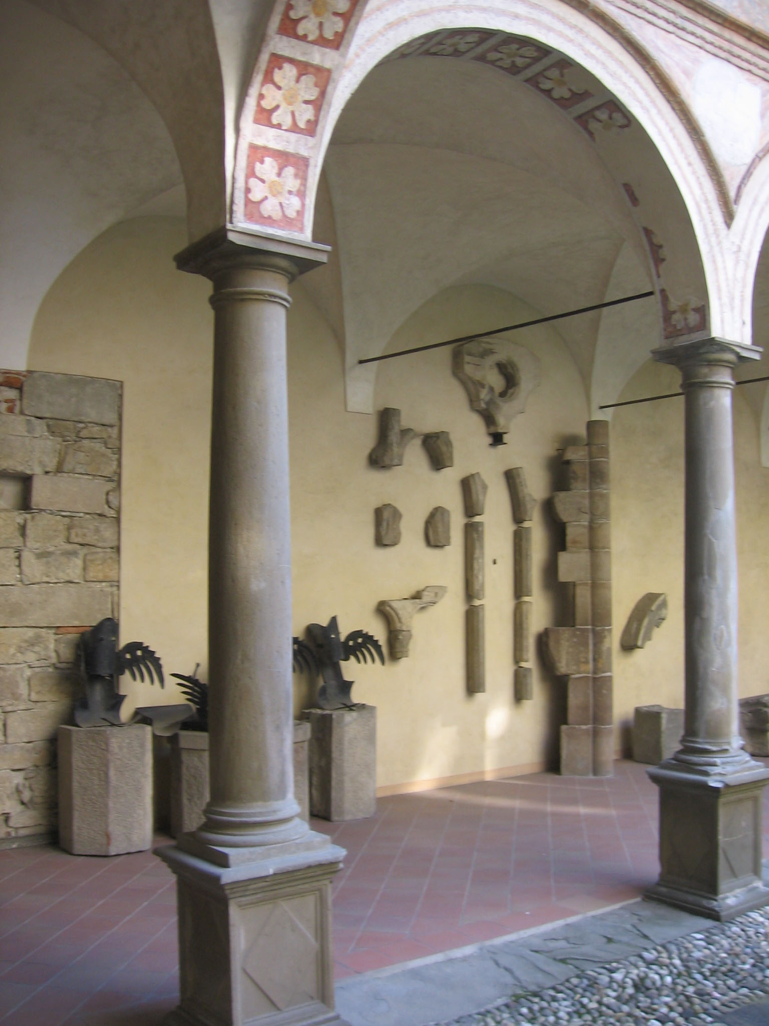 Pontida, Bergamo, Italia